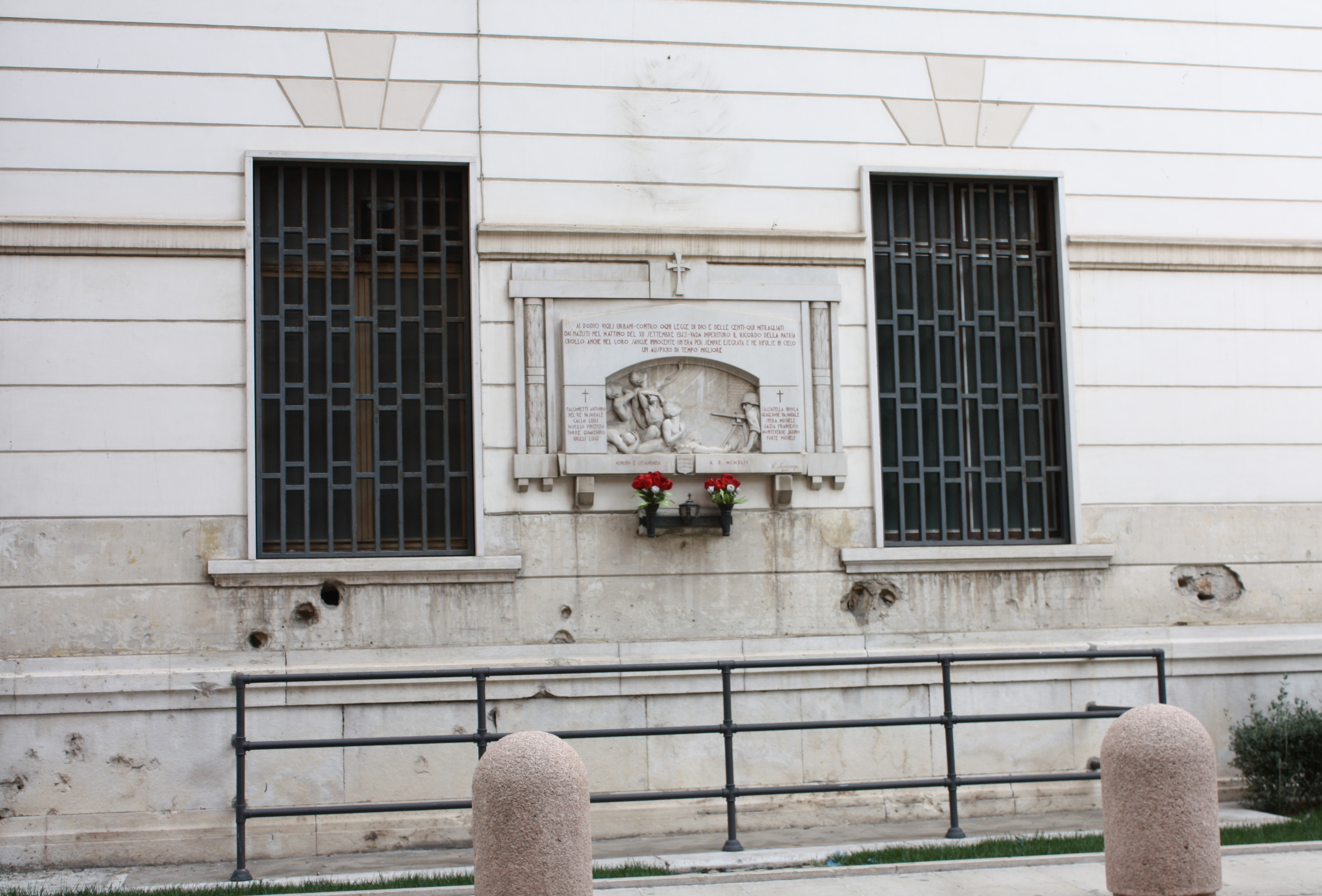 Barletta: Palazzo delle Poste. I colpi d'arma da fuoco tedeschi sul muro del palazzo.